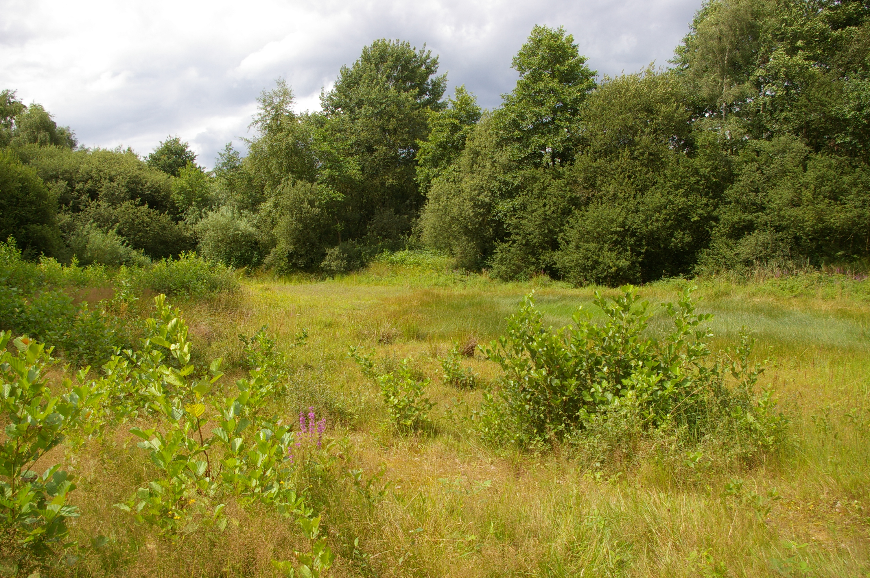 Kammmolch-Biotop bei Bassum